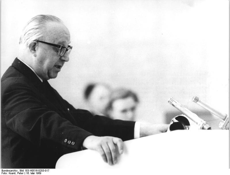 Zentralbild Koard-16.5.1969 Berlin: Bedeutsame 17. Sitzung des Staatsrates der DDR im Amtssitz am Marx-Engels-Platz. Im Amtssitz des Staatsrates am Marx-Engels-Platz: Der stellvertretende Vorsitzende der LDPD, Willi-Peter Konzok, nannte in seinem Diskussionsbeitrag die Bündnispolitik der Arbeiterklasse und ihrer Marxistischen Partei eine entscheidende Grundlage für das Wachsen der sozialistischen Menschengemeinschaft, und die Basis für eine vertrauensvolle Zusammenarbeit aller Klassen und Schichten zum Wohle der sozialistischen DDR.